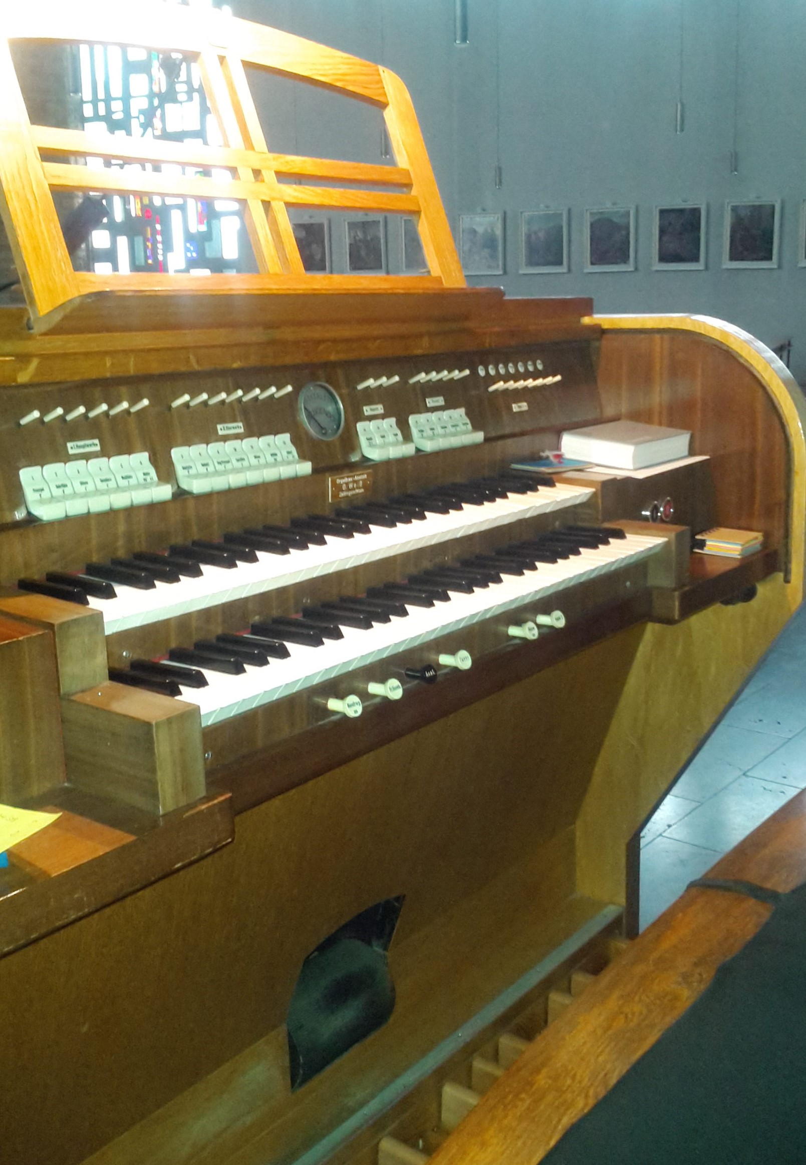 Spieltisch der Weiß-Orgel in der Pfarrkirche St. Bartholomäus, Bergtheim, Bayern, Deutschland